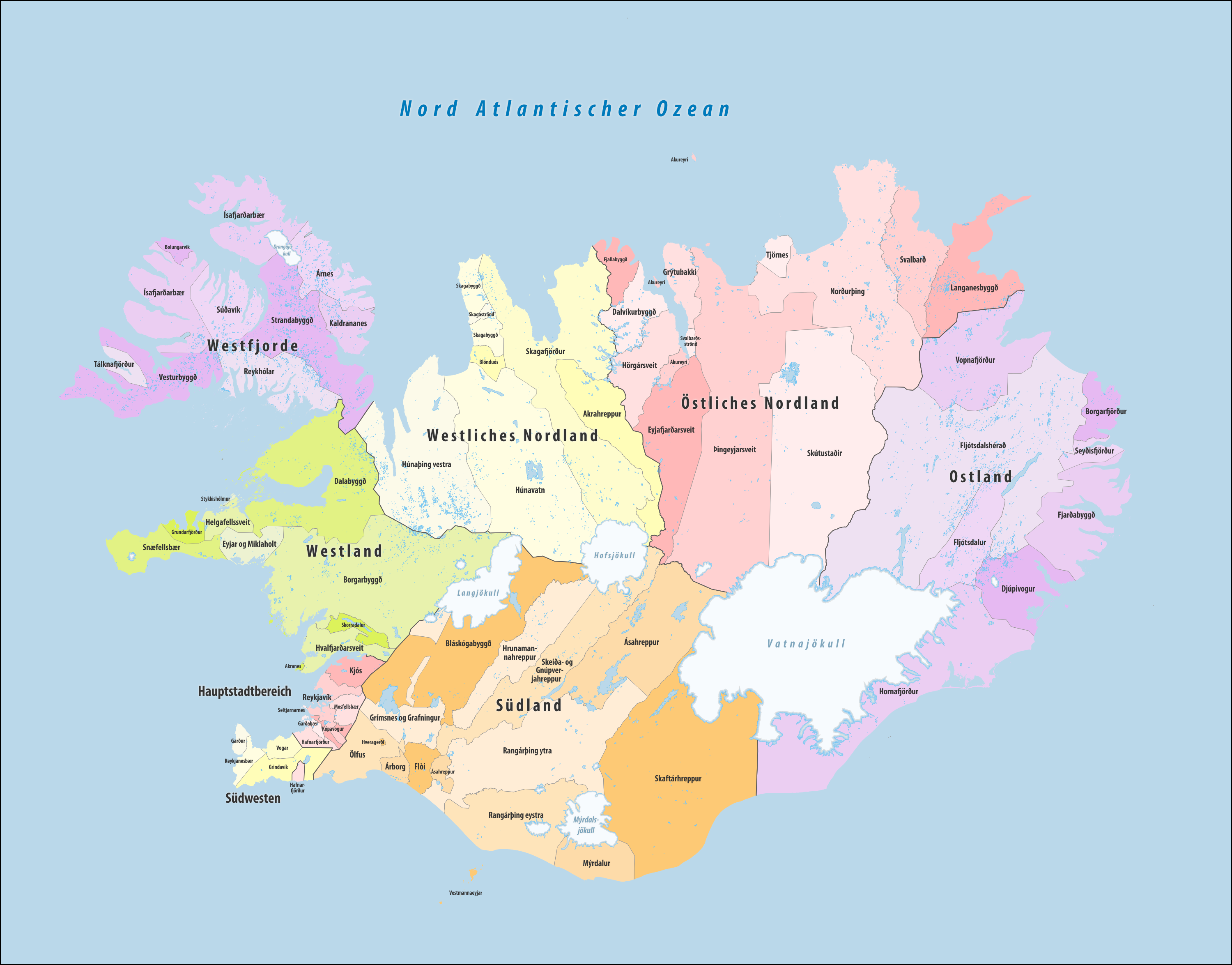 Politische Gliederung Islands